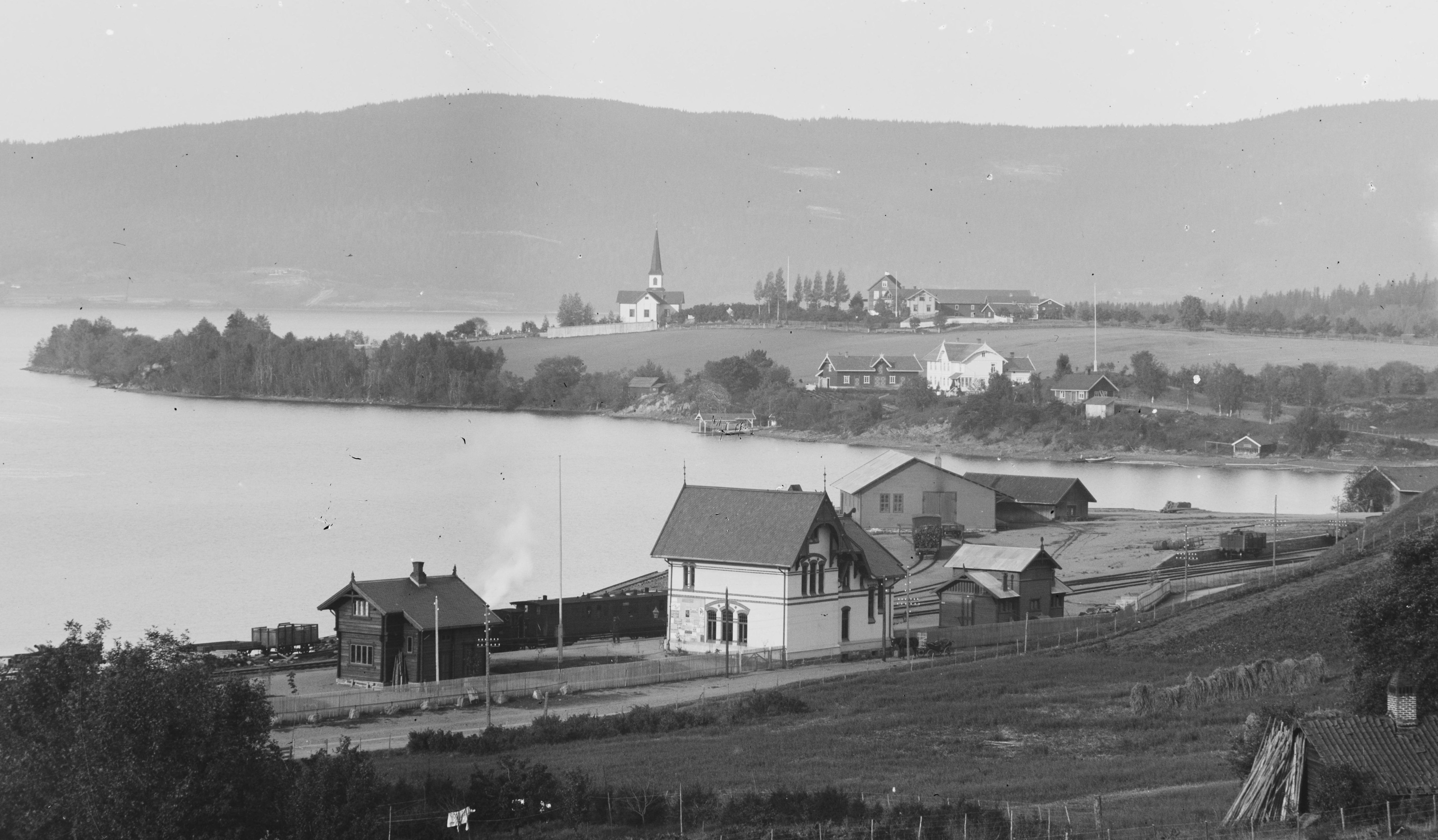 Stasjonsområdet i Røykenvika. Foto: Narve Skarpmoen, fra Nasjonalbibliotekets samling.